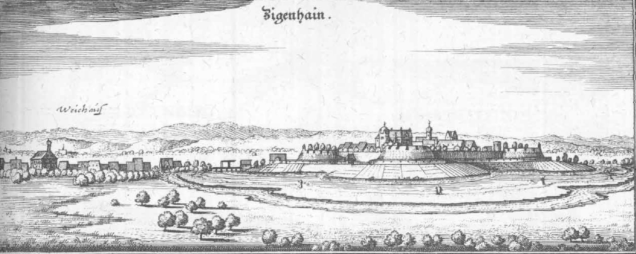 Ansicht der Festung bzw. der Stadt Ziegenhain im Jahr 1655, von Norden aus mit der Vorstadt Weichhaus